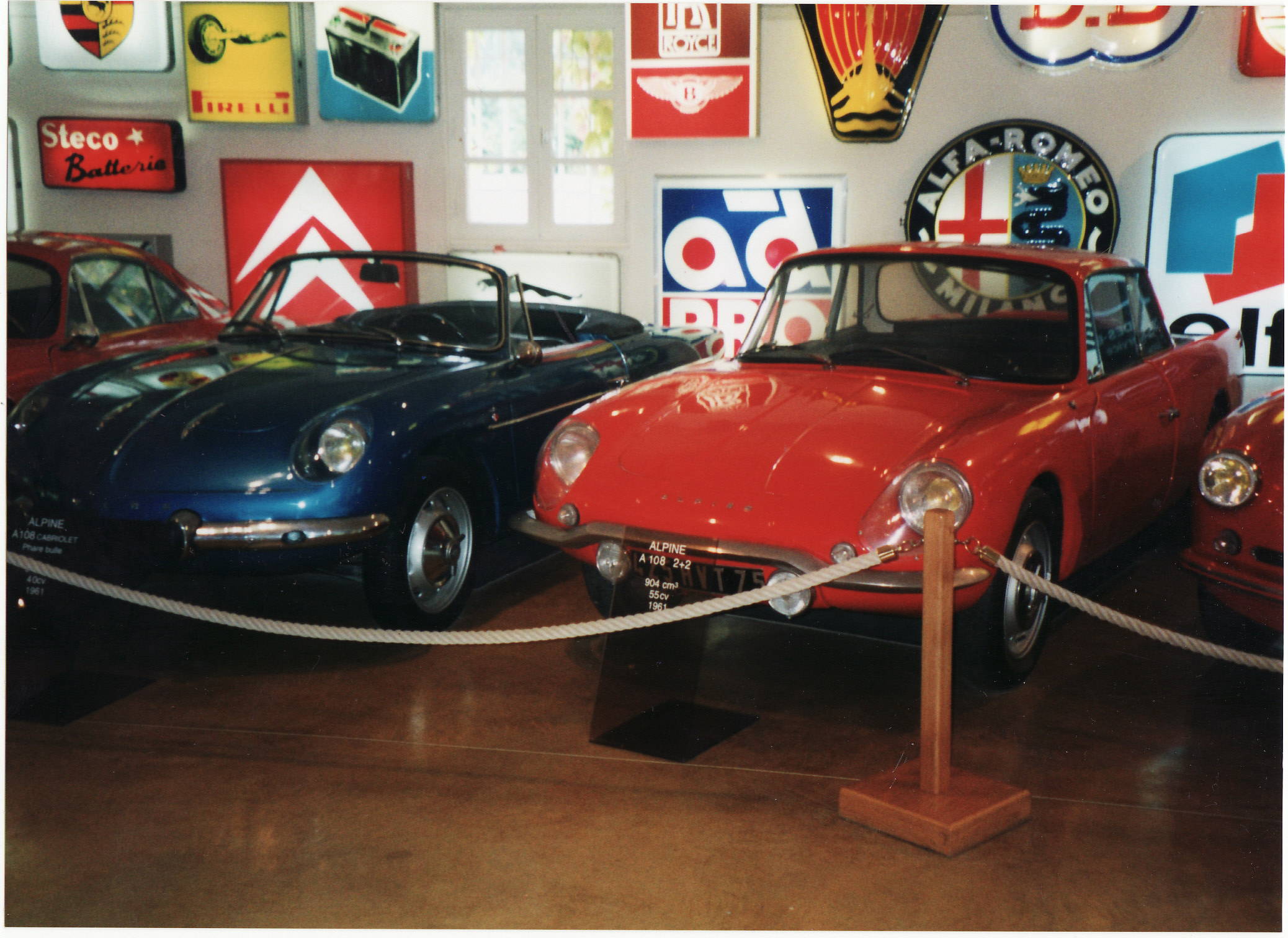 Alpine-Renault A108 Cabriolet & A108 2+2 c.1961-62